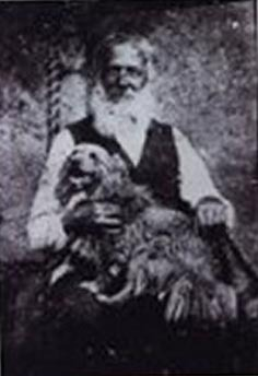 Sévère D'Aoust